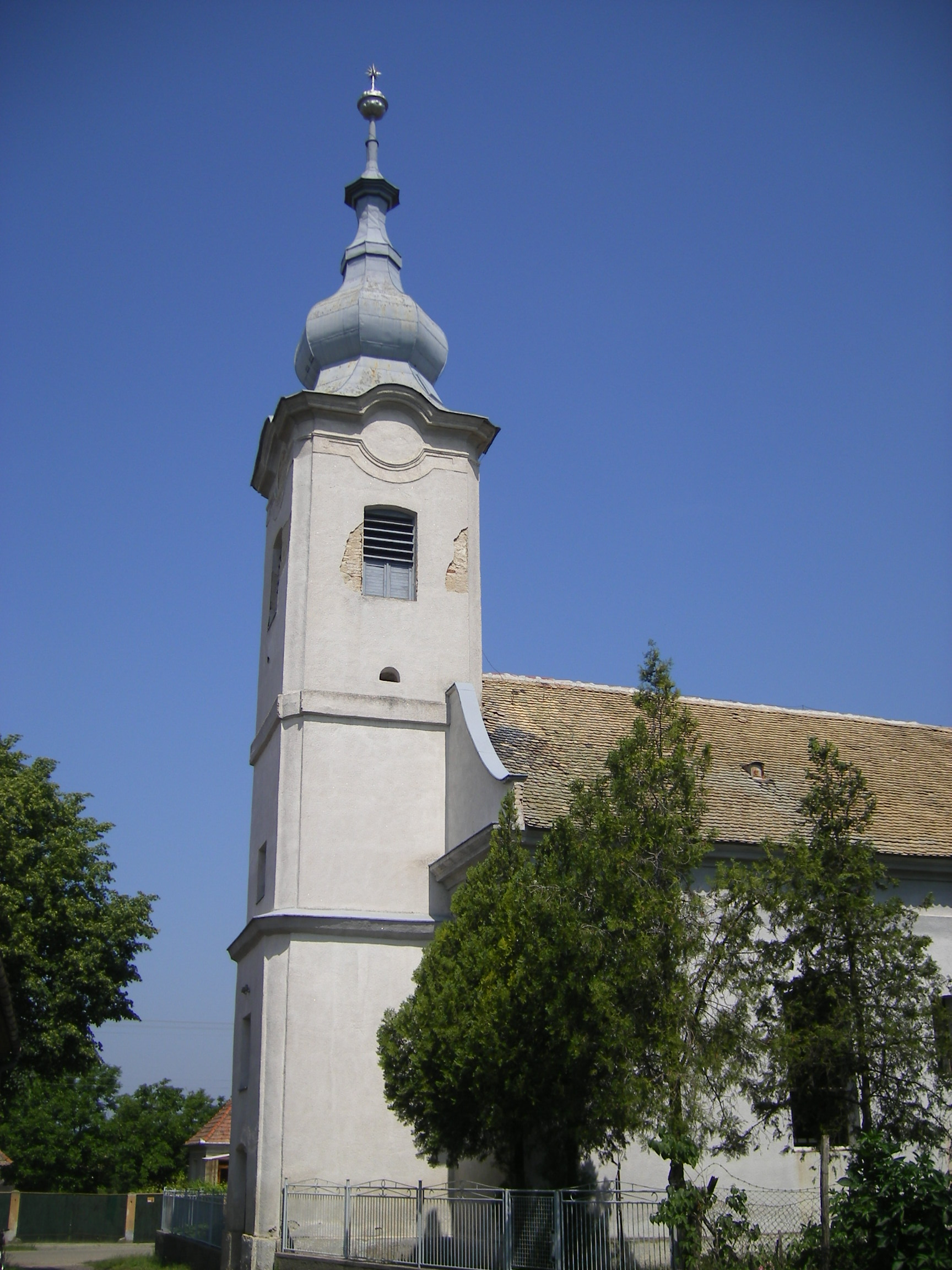 Komáromszentpéter - Református templom